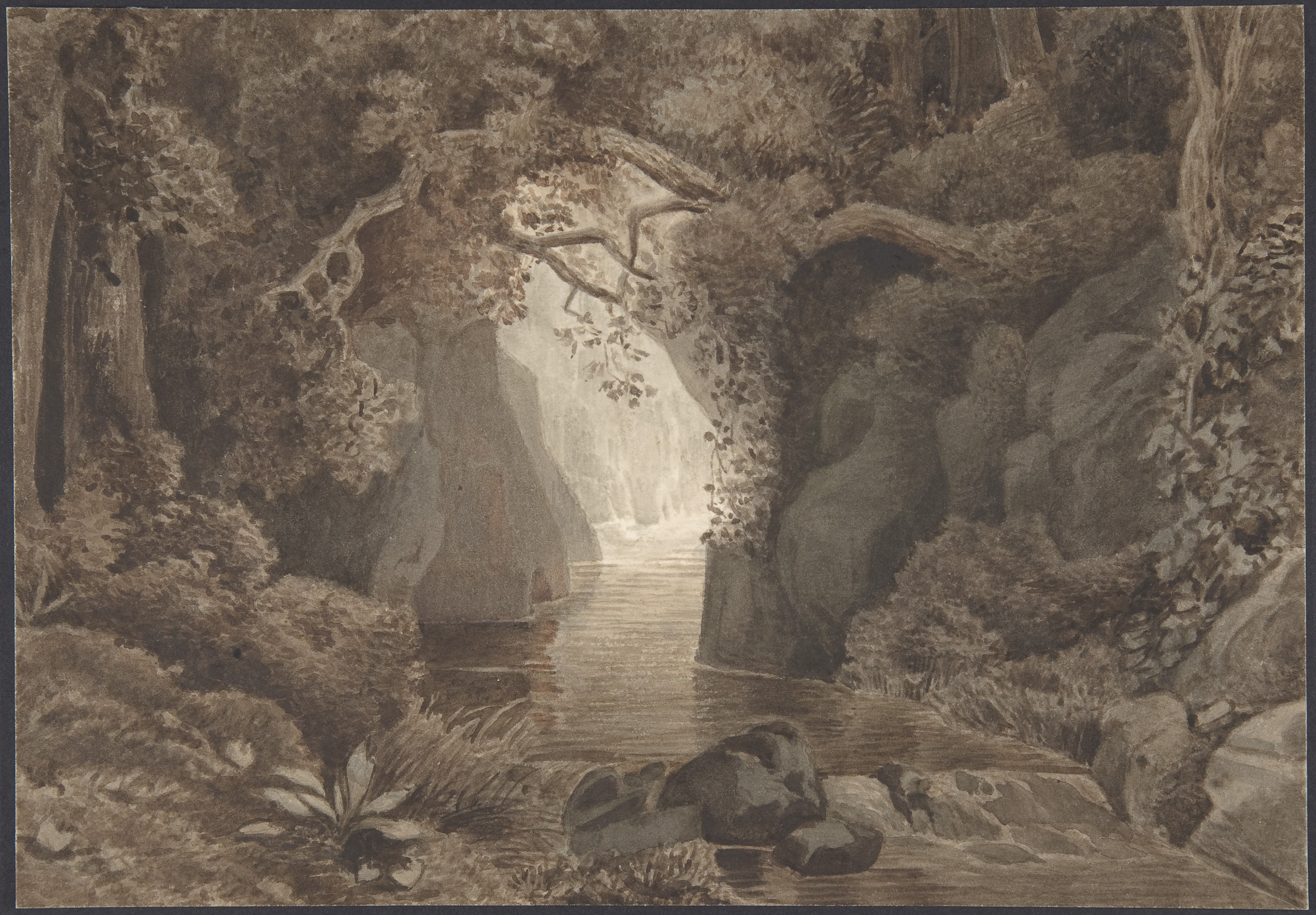 Drawing; Drawings